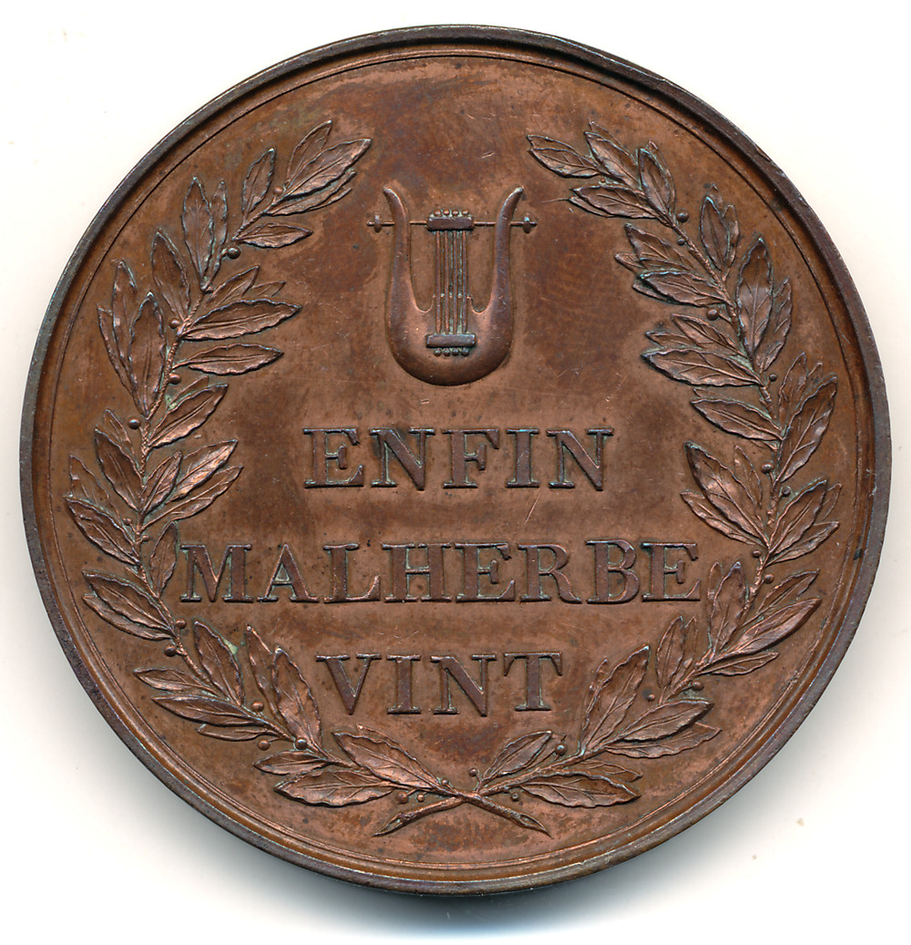 Revers de la médaille de Malherbe, par Gatteaux, pour la ville de Caen, 1815, cuivre 41mm